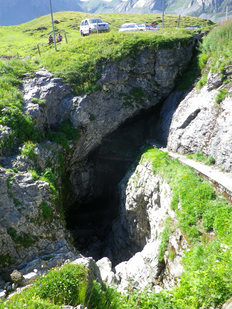 Stäublich auf Melchsee-Frutt, Abfluss des Melchsees